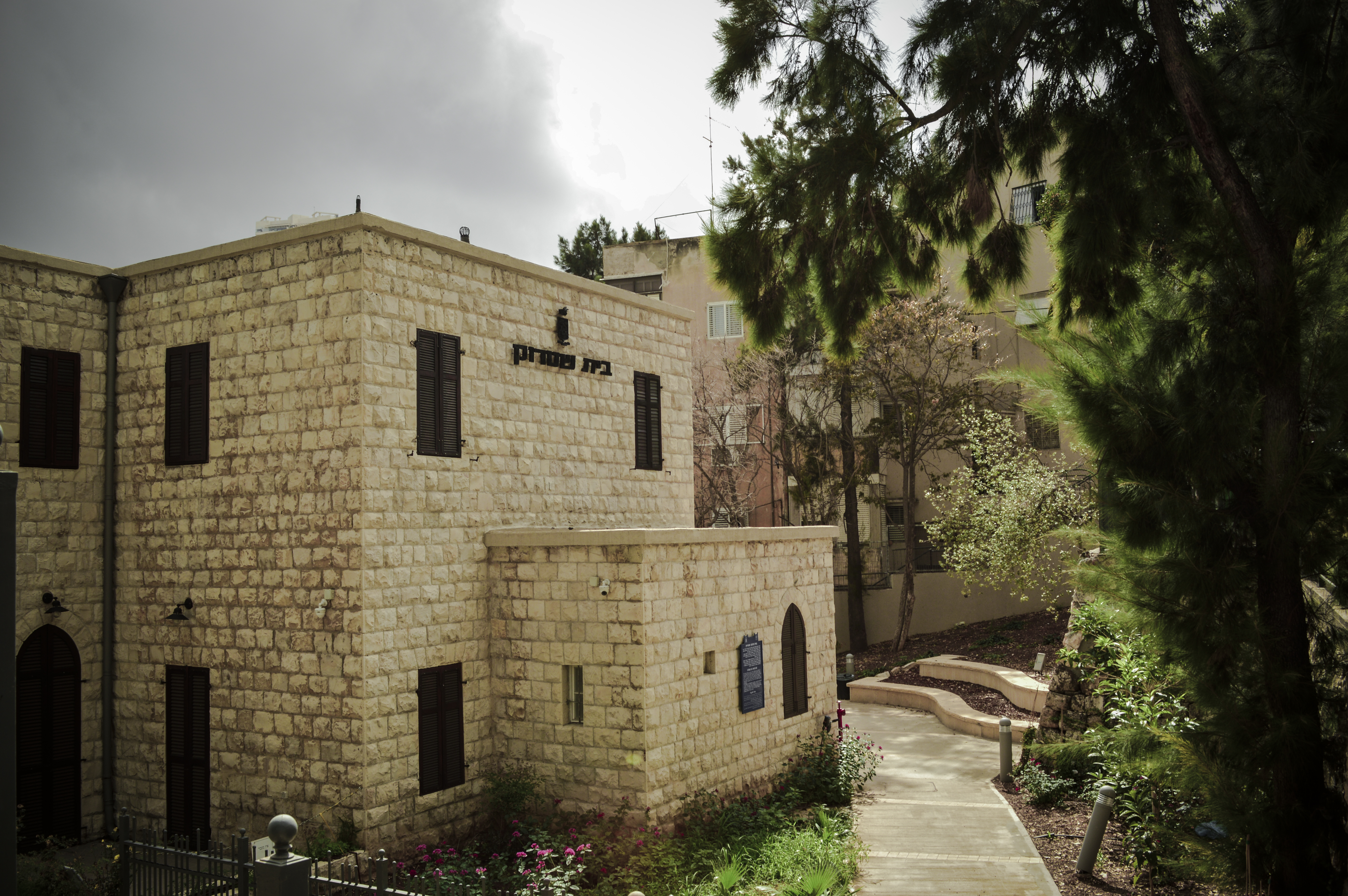 בית הרמן שטרוק, רח' ארלוזורוב 23, חיפה